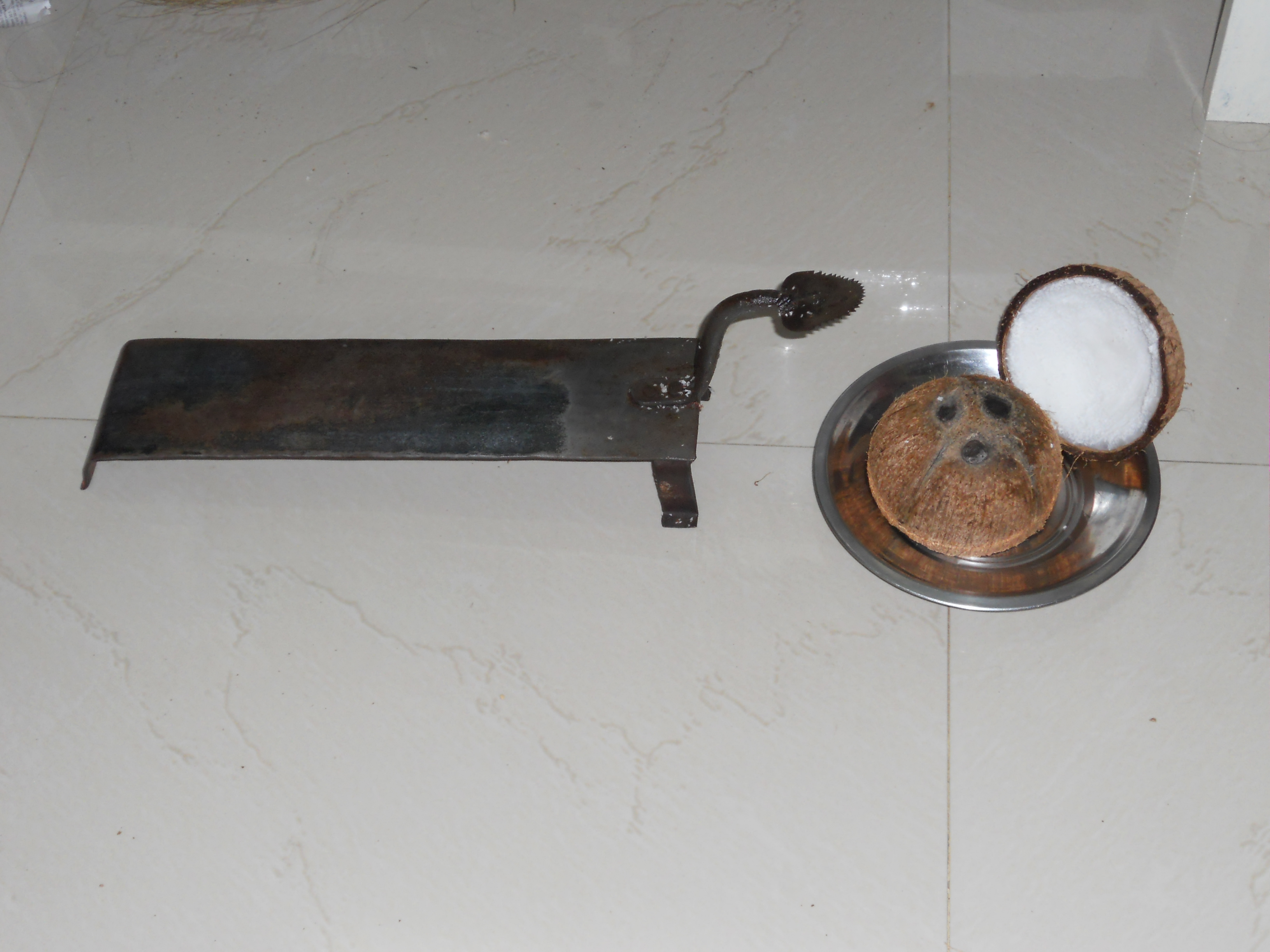 ചിരവ